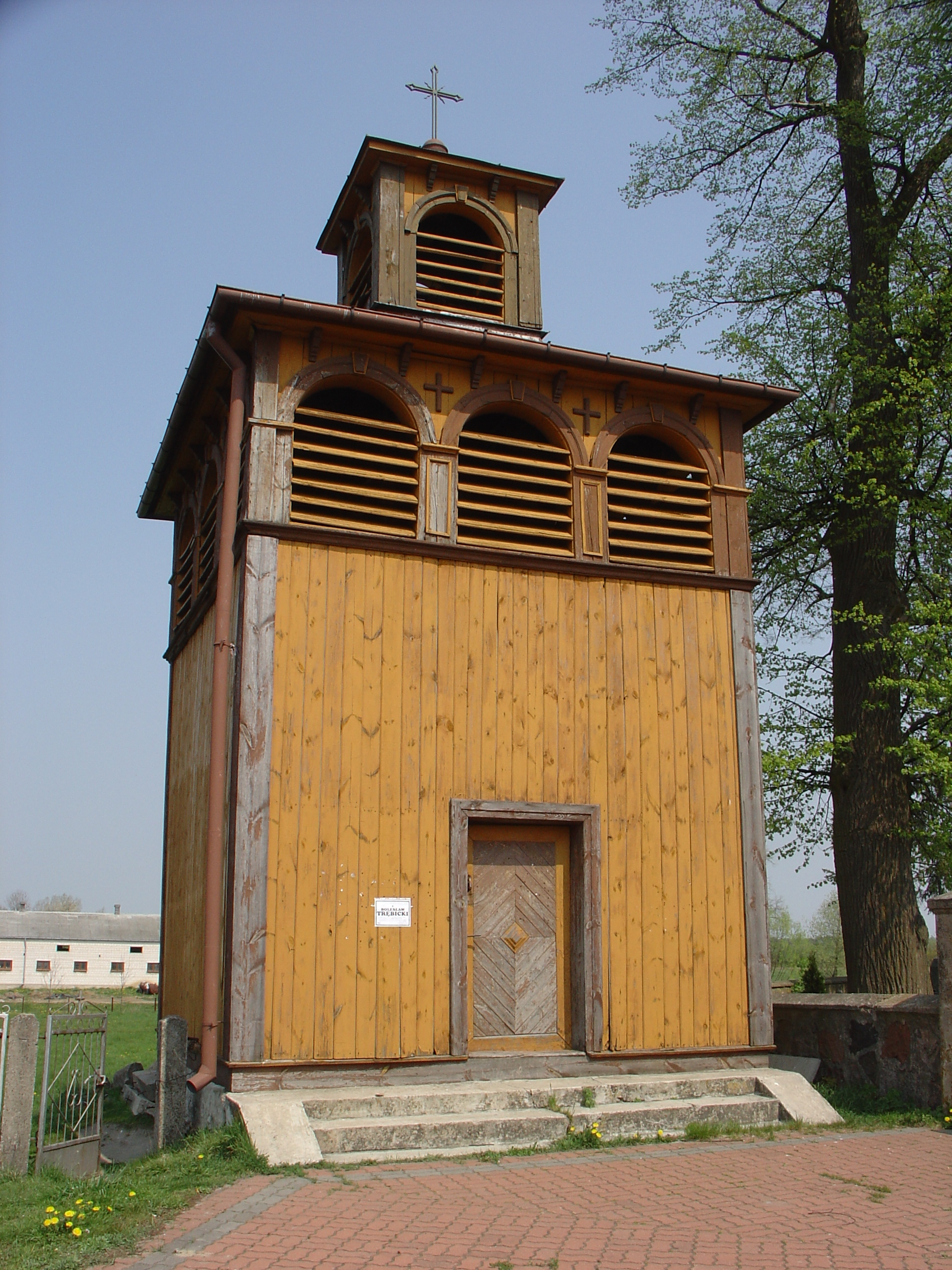 Dzownnica przy kościele pw. św. Bartłomieja w Paprotni